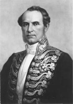 Obra da coleção Brasiliana Iconográfica.